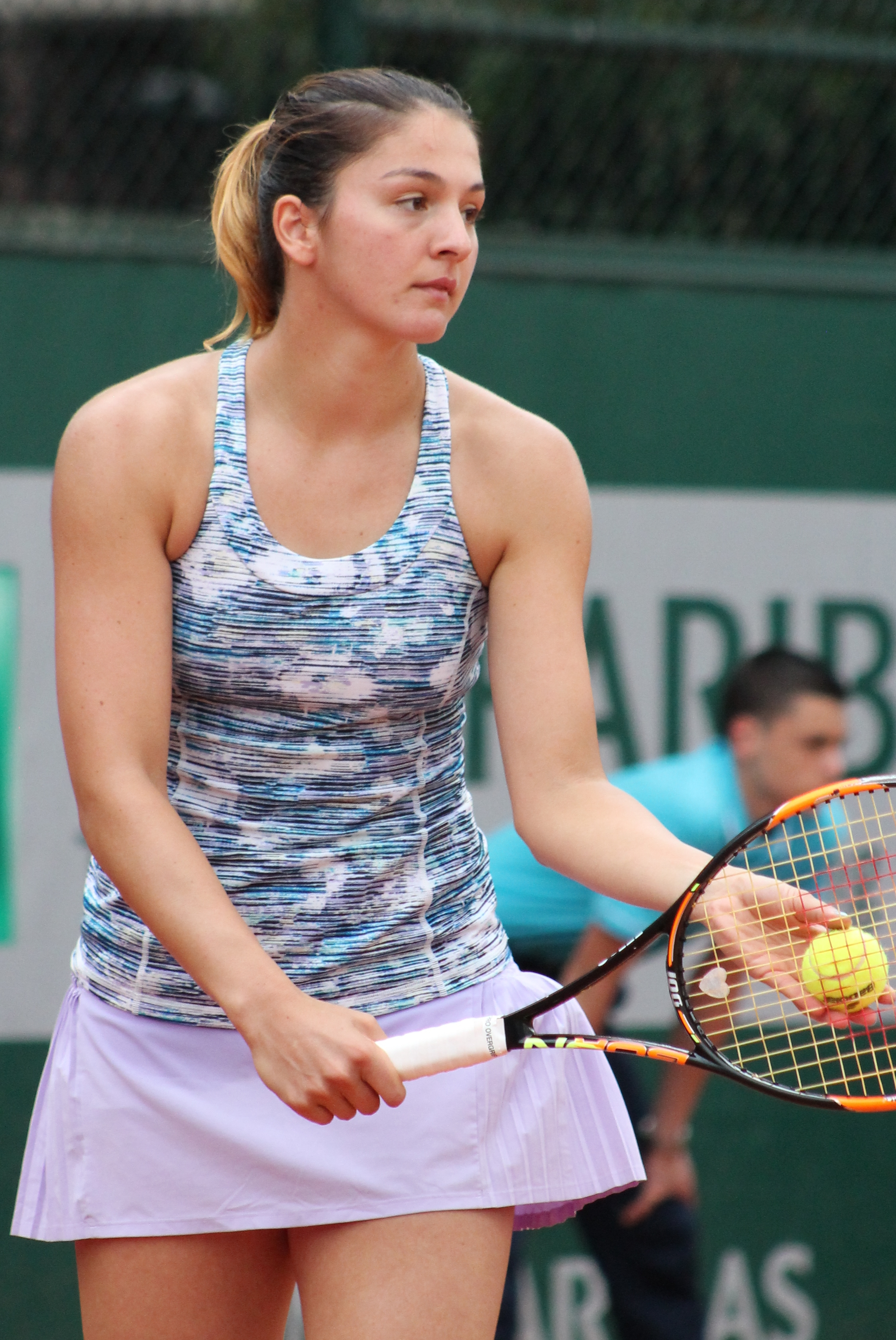 Gasparyan RG16 (7)